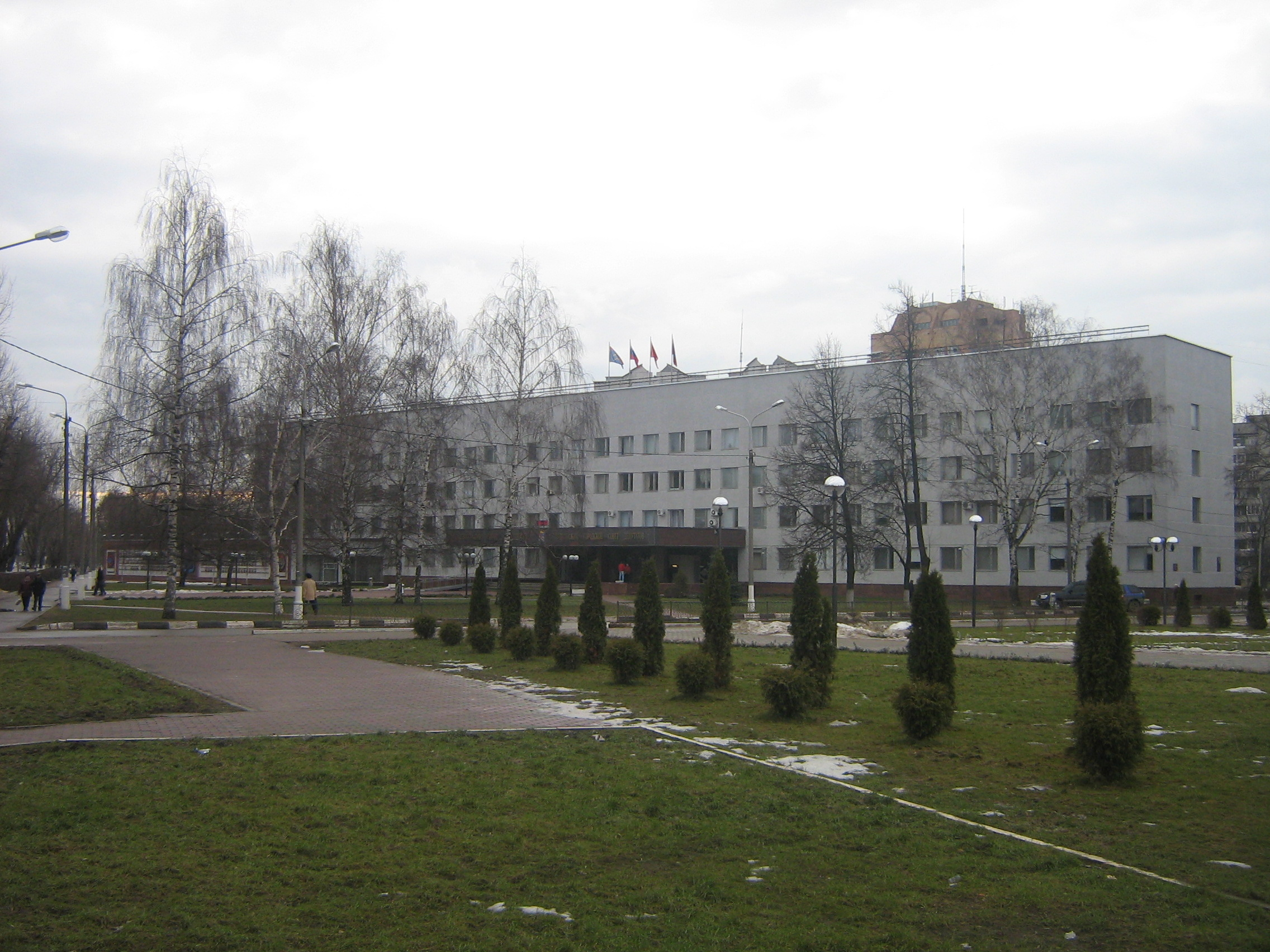 Здание Подольского городского Совета депутатов и Администрации города Подольска (улица Кирова, дом 4). Фотография 17.03.2007